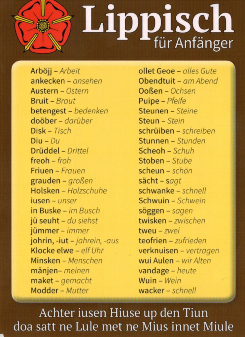 "Lippisch für Anfänger" Spruch auf der Vorderseite in Hochdeutsch: "Hinter unserem Hause auf dem Zaun da sitzt eine Katze mit 'ner Maus im Maul"